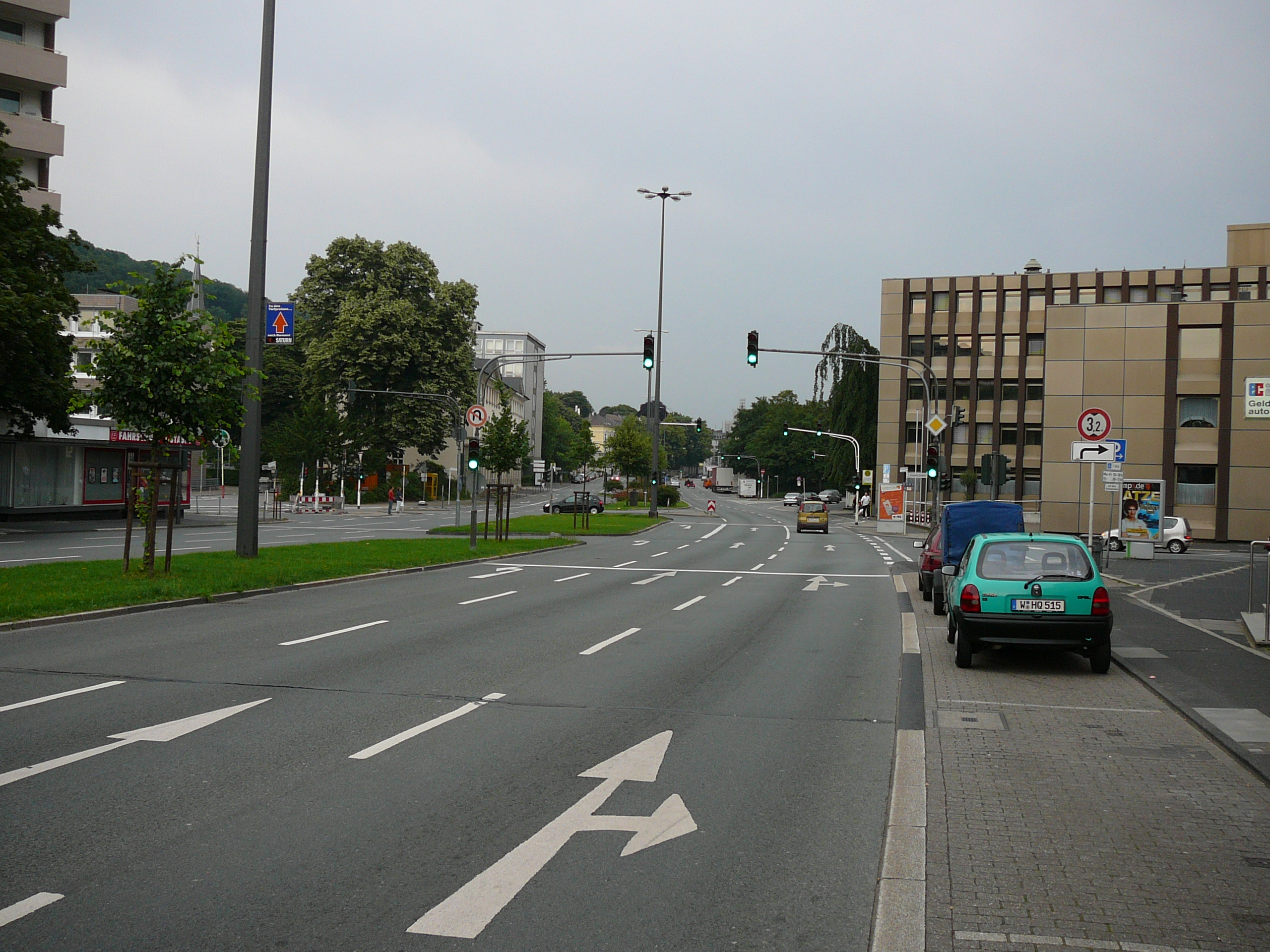 Friedrich-Engels-Allee, Wuppertal